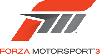 Forza Motorsport 3 Logo